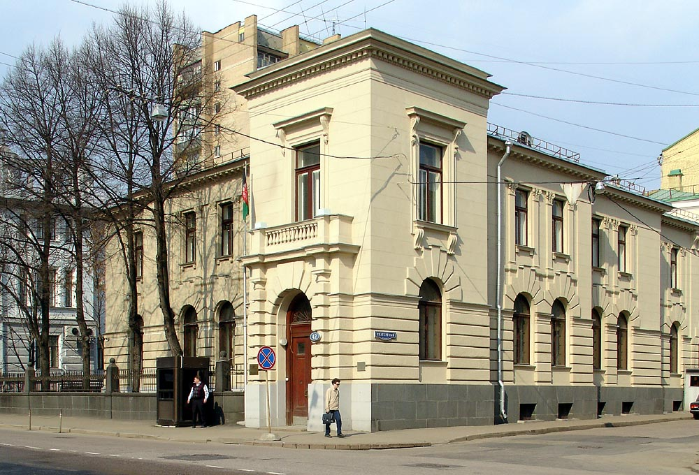 42 Povarskaya Street, Moscow. Ponizovsky House by Lev Kekushev